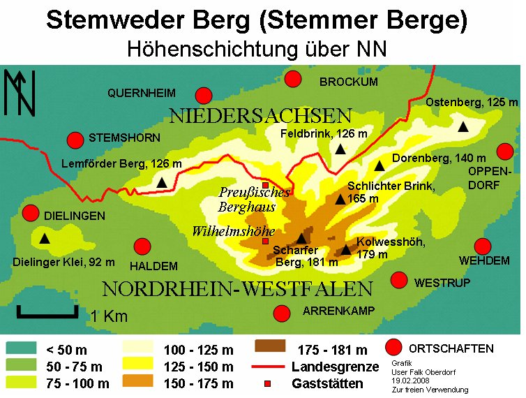 Höhenschichtung des Stemweder Berges